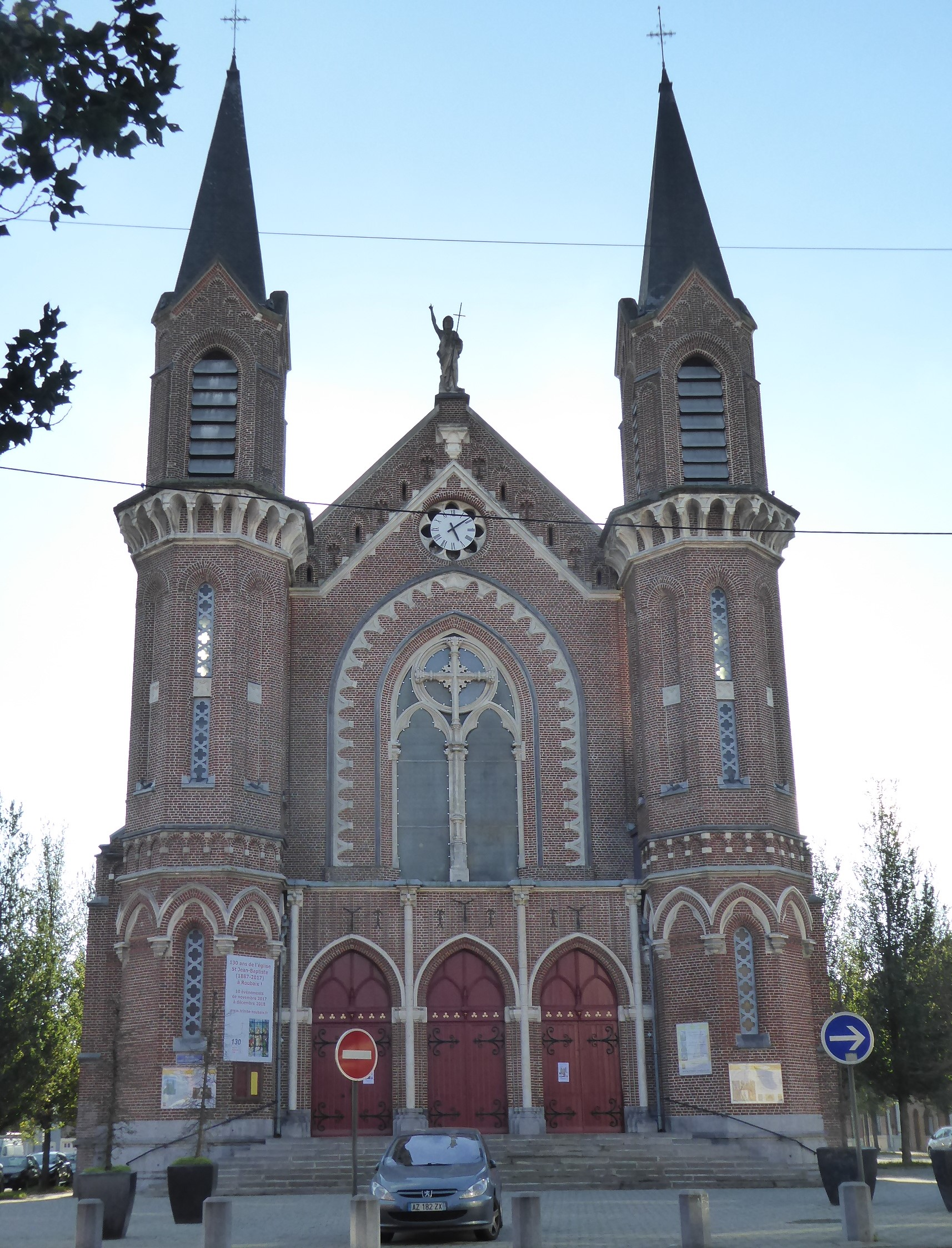 Eglise St-Jean-Baptiste Roubaix